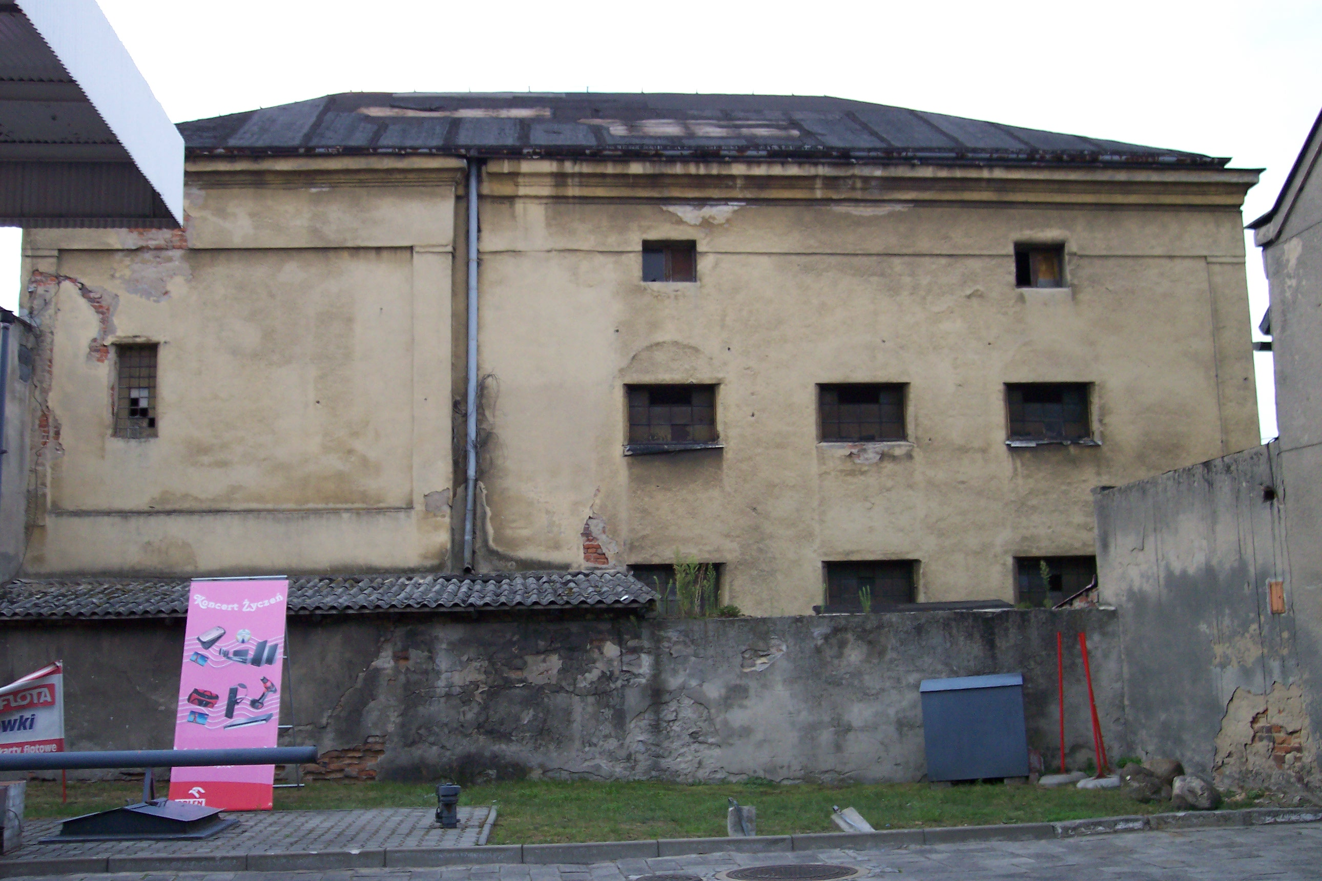 Budynek byłej synagoga w Wielowsi (województwo śląskie)